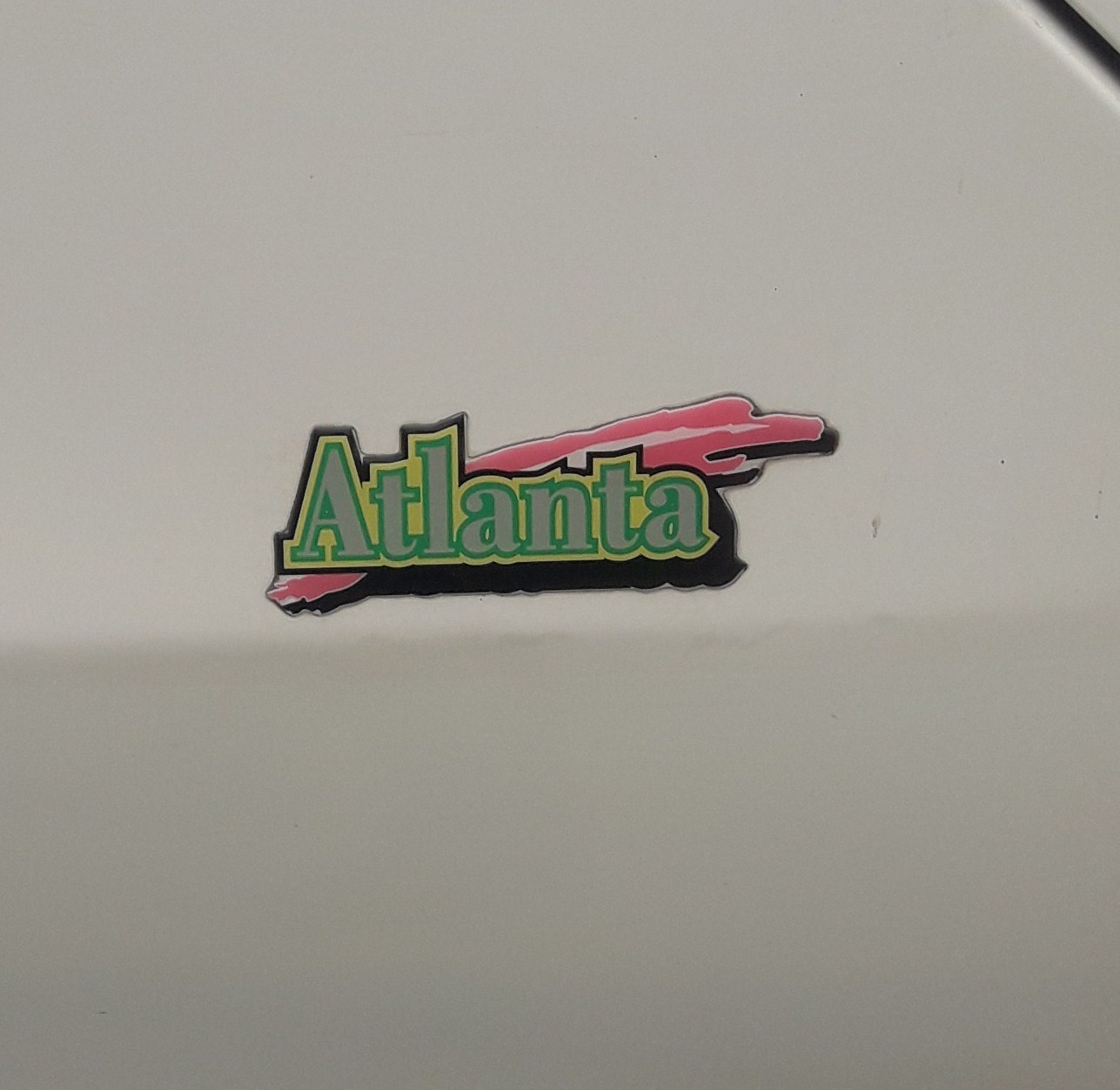 Śkoda Felicia Atlanta edition,samsung